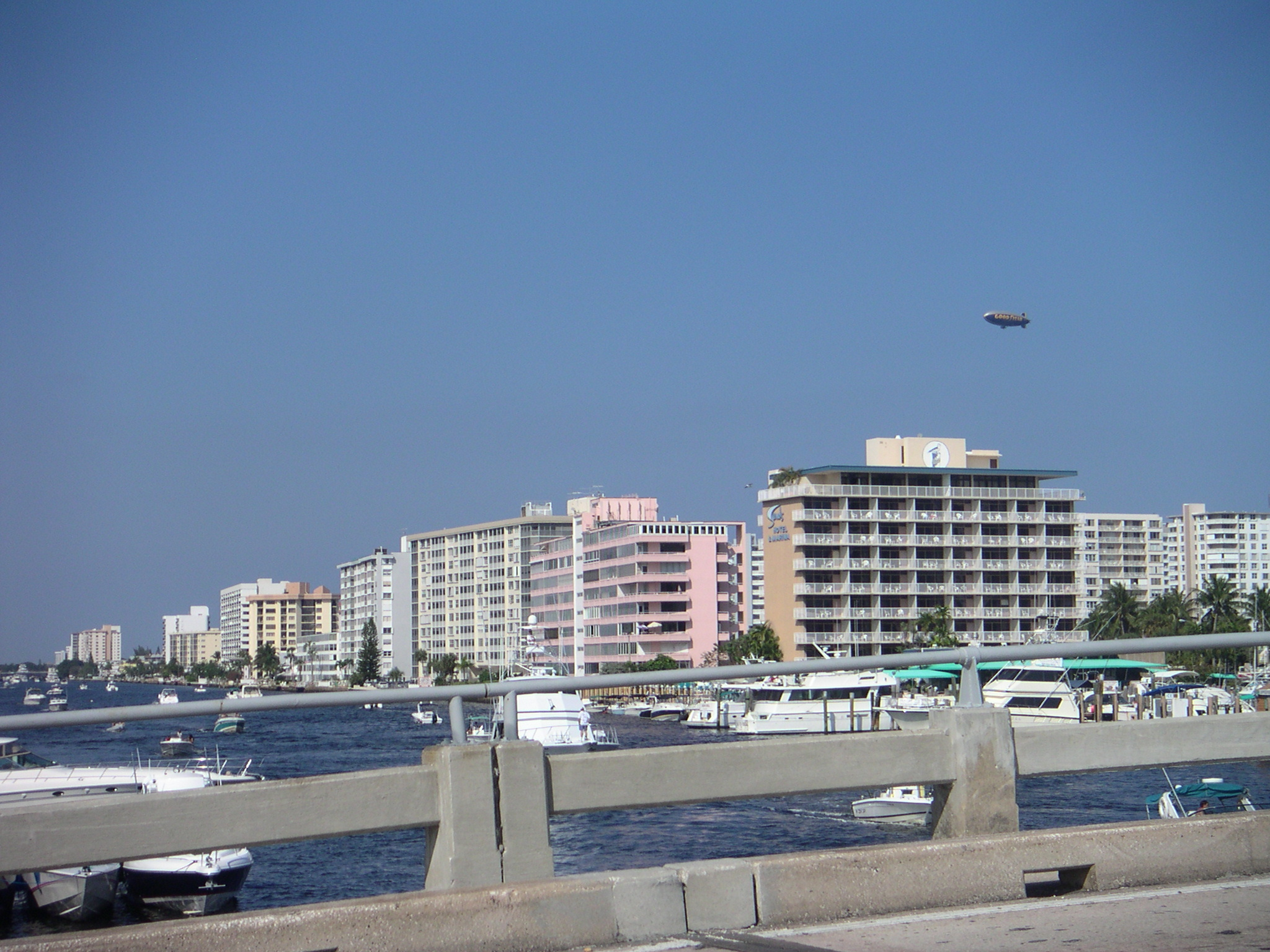 Pompano Beach, Florida -- Feb. 2004